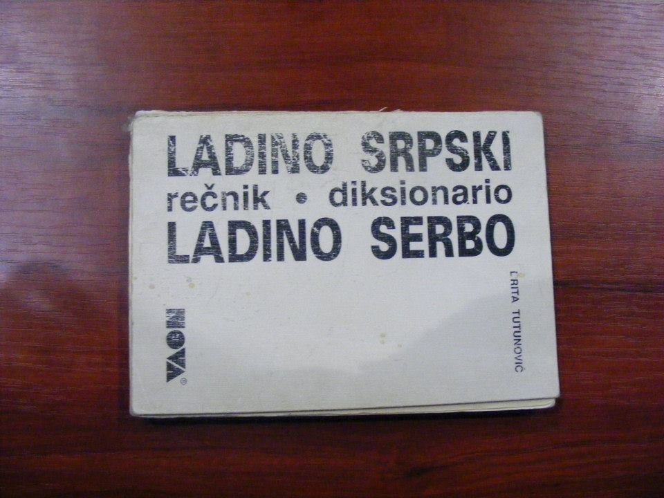 Српски (ћирилица): прва страна речника